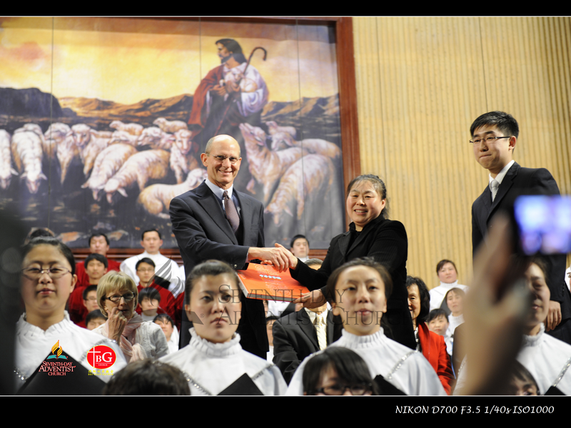 基督复临安息日会全球总会会长访问北关教会时，由郝雅杰牧师赠送礼物。